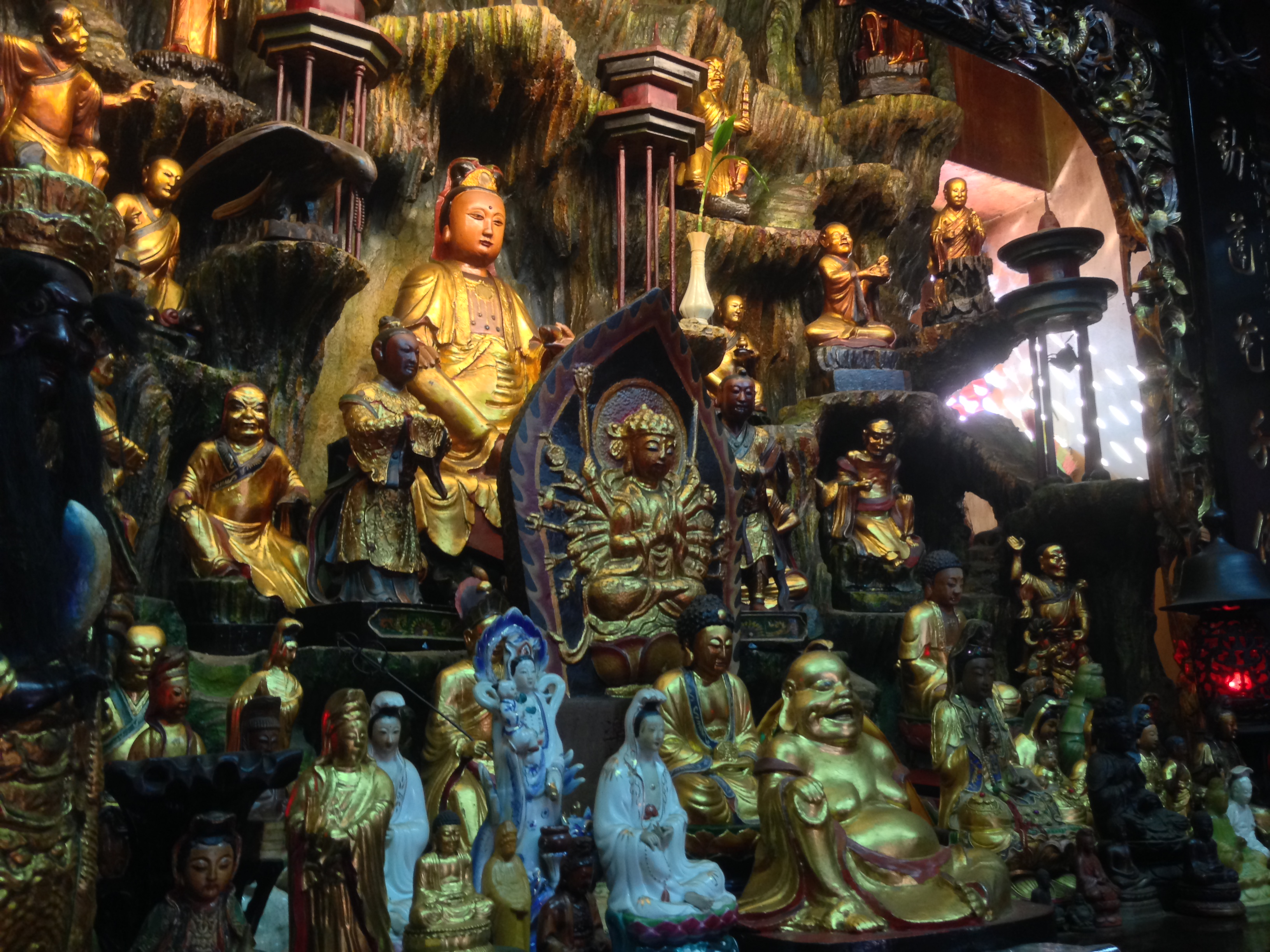 羅東震安宮後殿觀音等神像